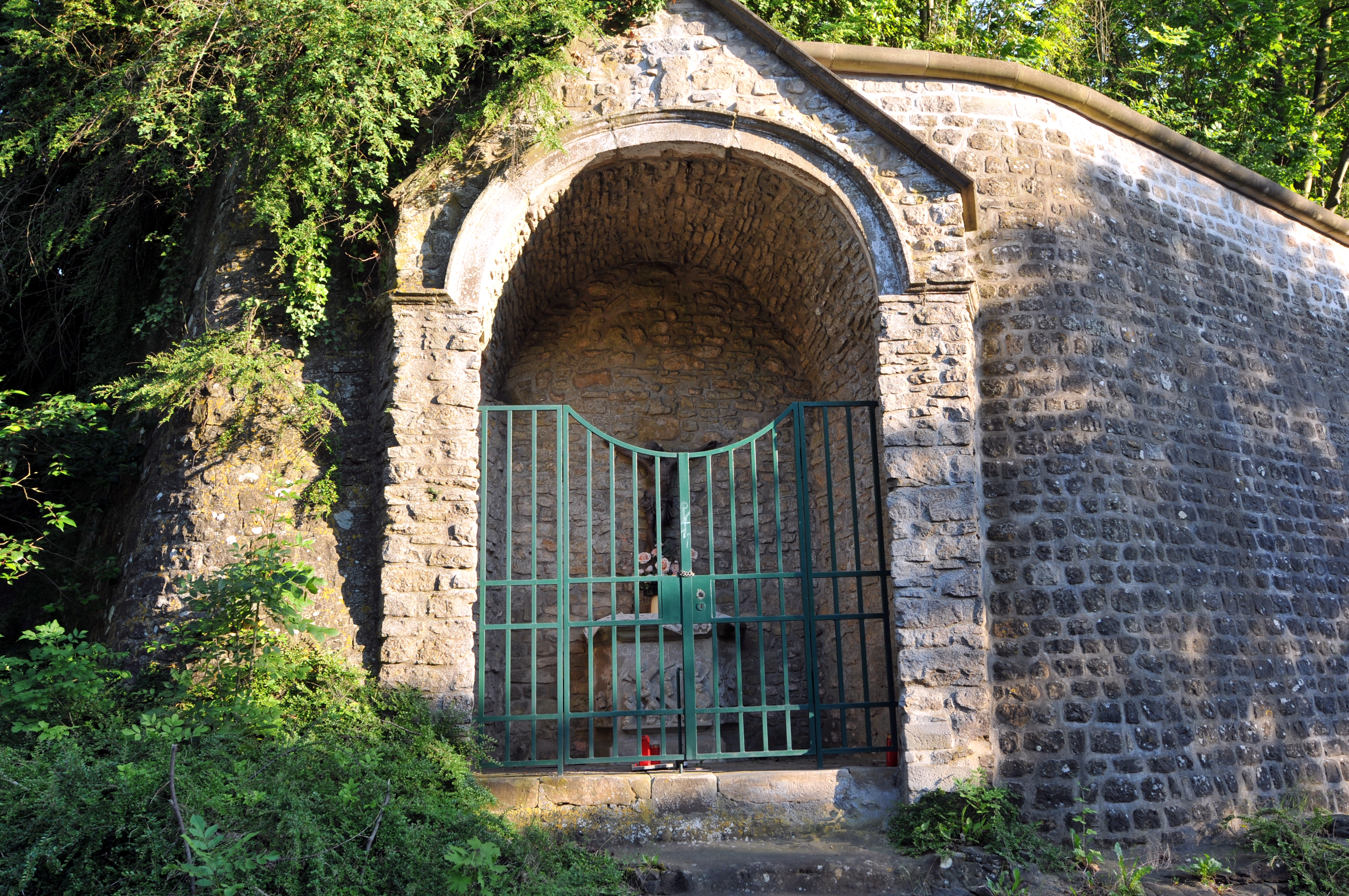 D'Strock-Kapell op der Héicht vum Kosakestee op der Tréierer Strooss.